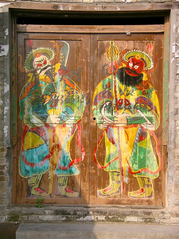 Foto: Tor Svensson Fenghuang, Kina